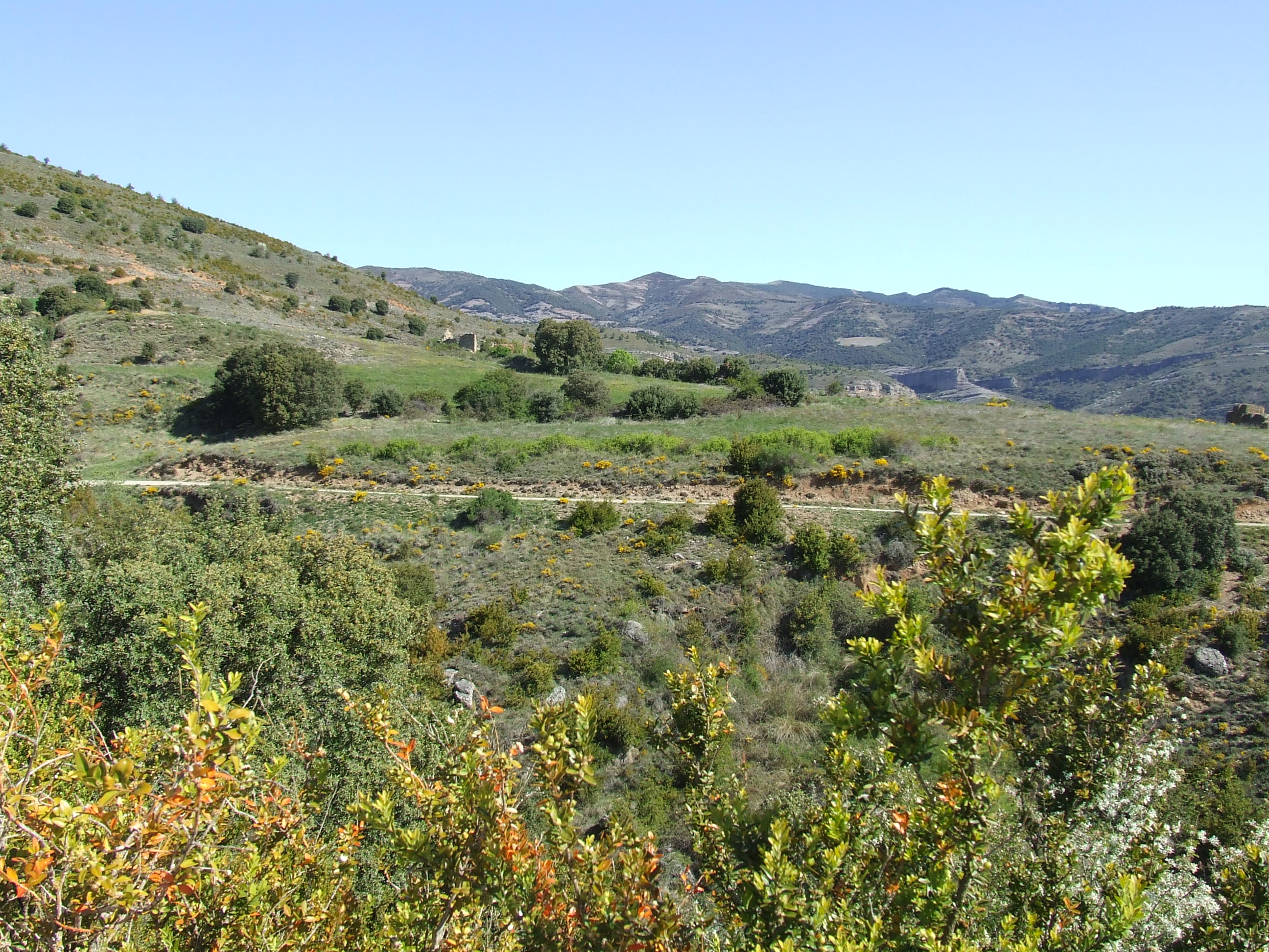 Les Bordes de Seix, un antic veïnat quasi del tot desaparegut (Gurp de la Conca, Tremp, Pallars Jussà)